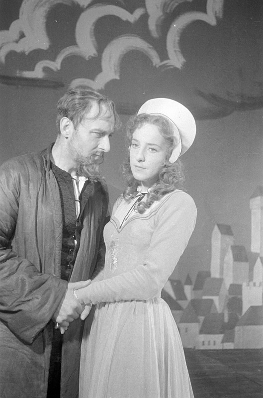 Original image description from the Deutsche Fotothek Szenenbilder "Urfaust" mit Otto Eduard Hasse als Mephisto